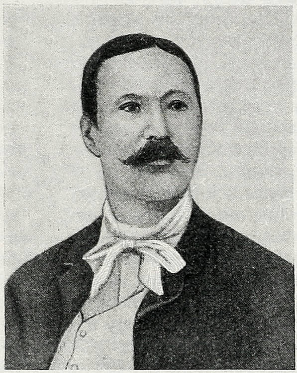 Эта фотография была использована для иллюстрирования статьи «Ковалевские» опубликованной в тринадцатом томе «Военной энциклопедии», который был издан книгоиздательским товариществом И. Д. Сытина в 1913 году в столице Российской империи городе Санкт-Петербурге. Более подробное описание к этой картинке можно прочесть в указанной выше статье.